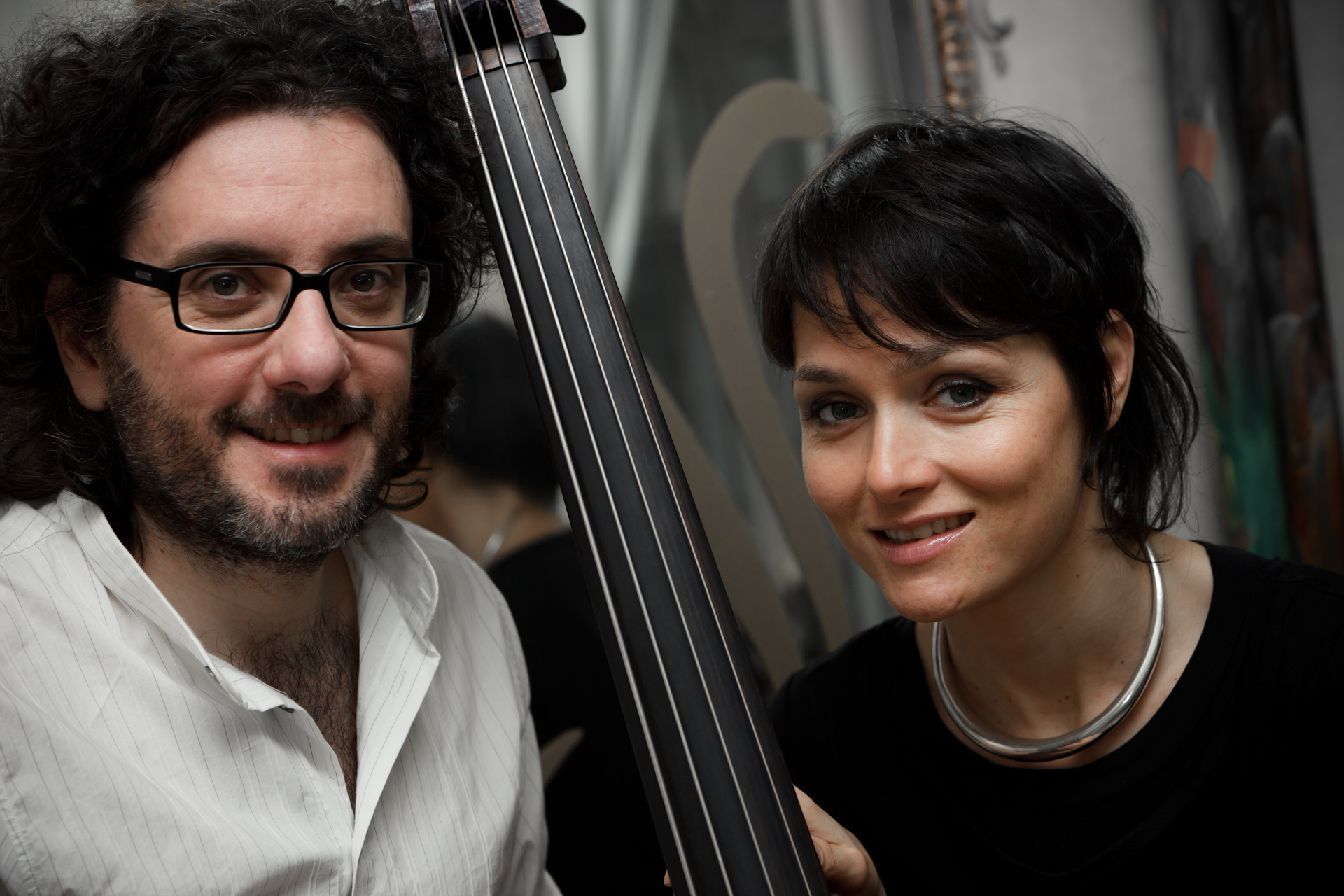 Ferruccio Spinetti e Petra Magoni, 30 marzo 2011.